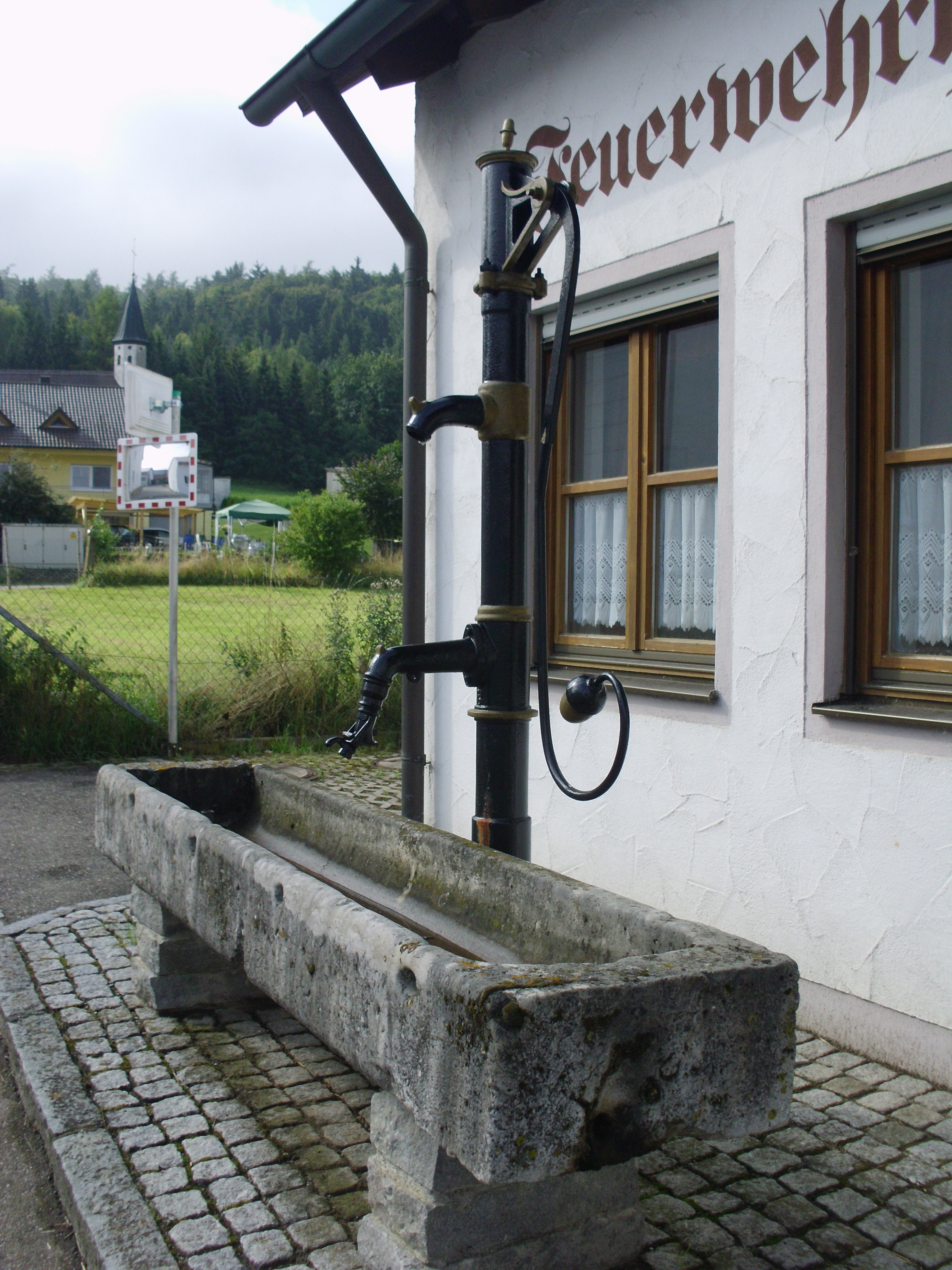 Ellenbrunn (Markt Rennertshofen) im Landkreis Neuburg-Schrobenhausen, Brunnenpumpe vpr dem Feuerwehrhaus